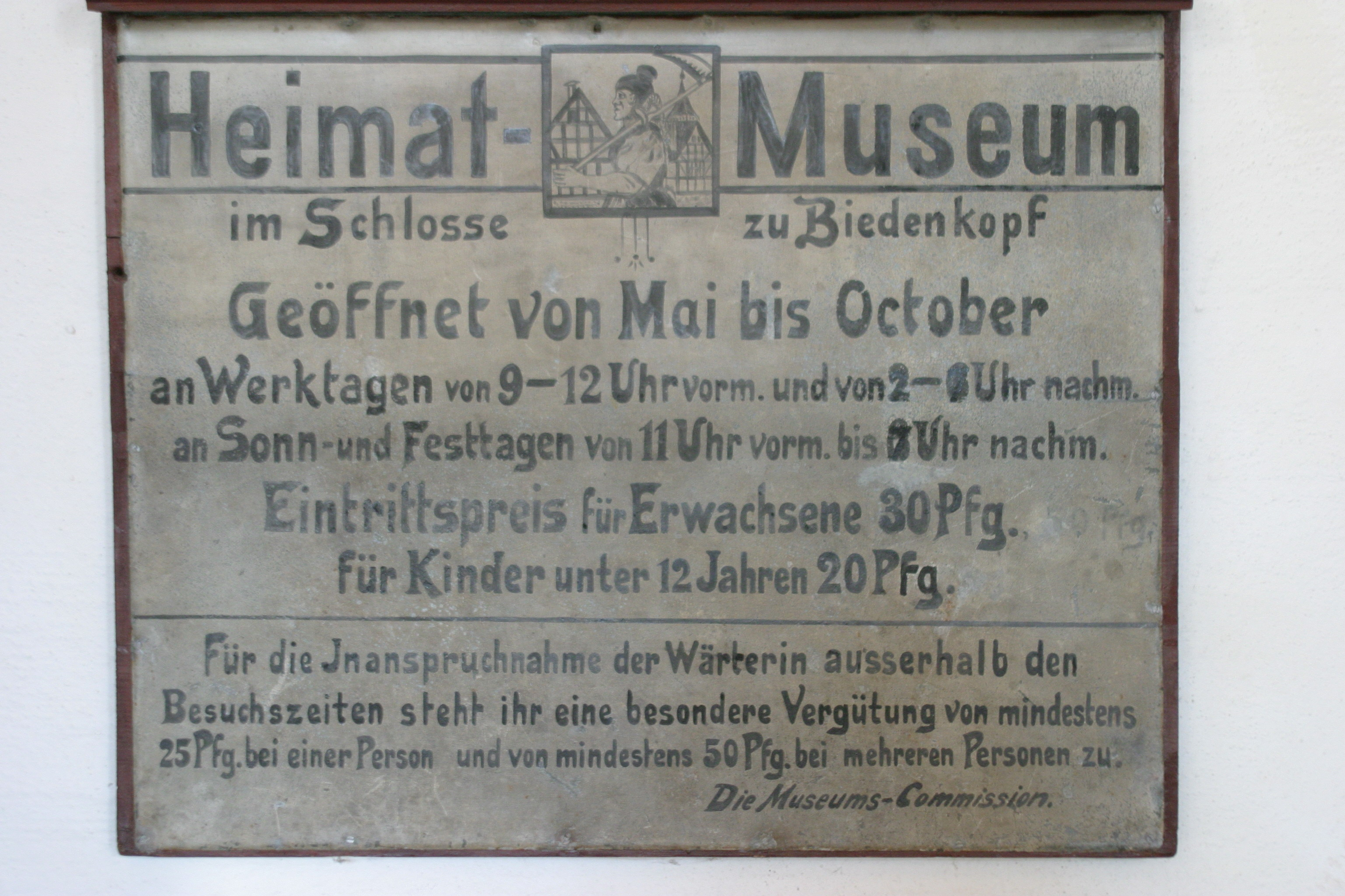 Hinweisschild am Heimatmuseum im Schloss Biedenkopf, historisch. Vormals an der Außenwand des Palas des Landgrafenschlosses in Biedenkopf angebracht; nun im Erdgeschoss des dortigen Hinterlandmuseums installiert.